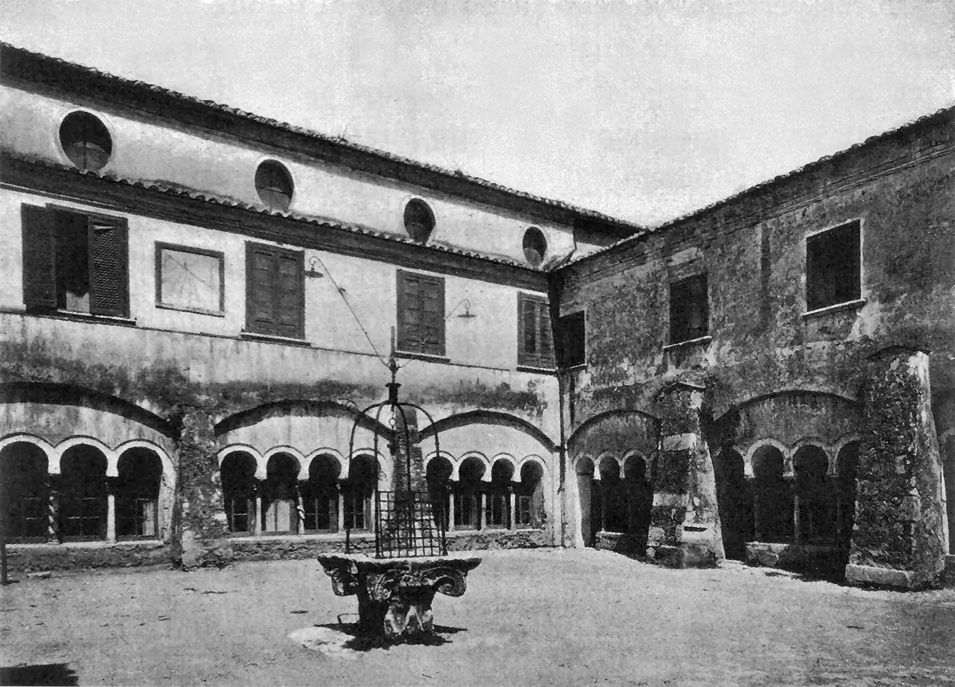 Vecchia foto del chiostro della Chiesa di Santa Sofia, Benevento